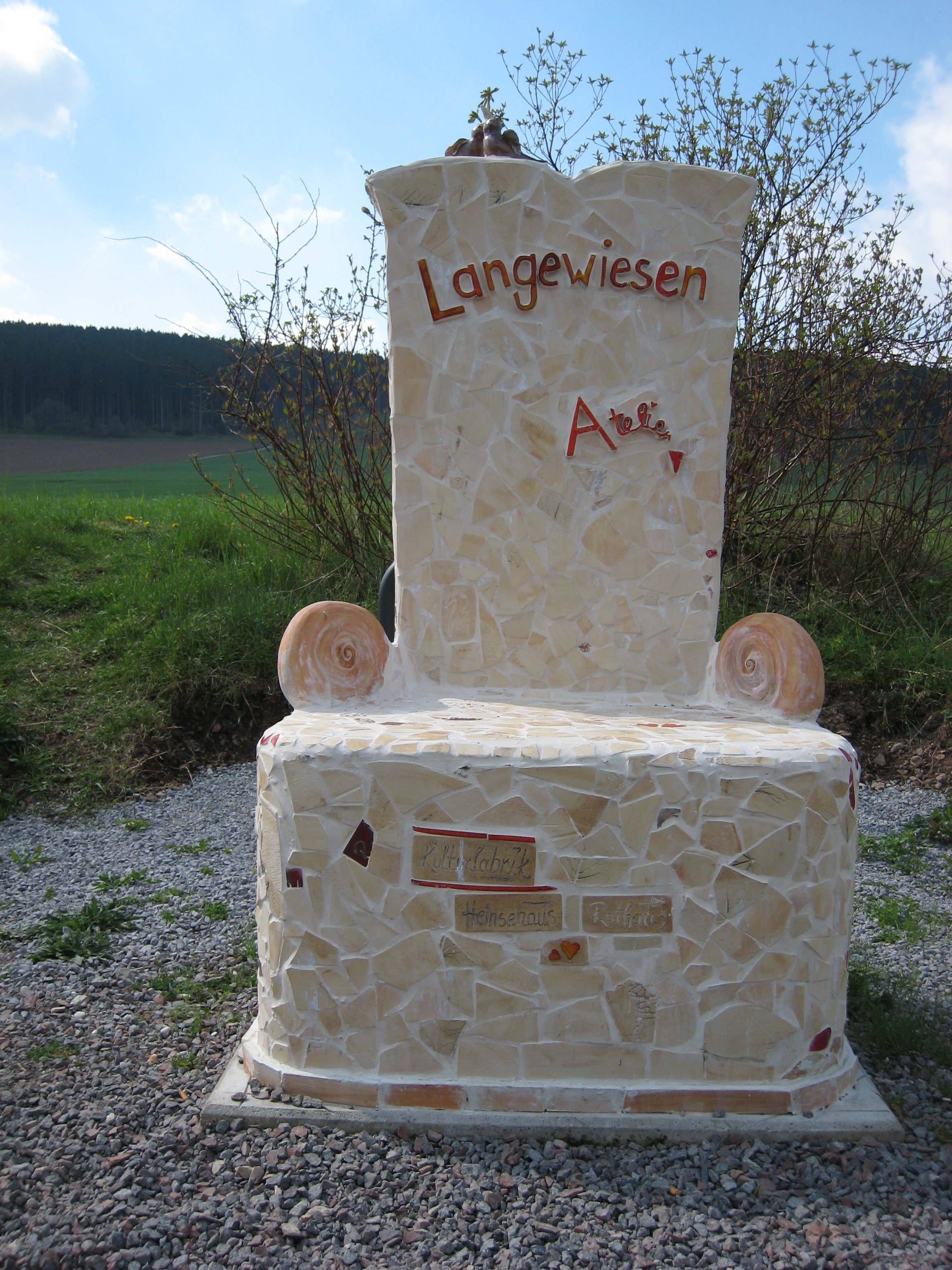 Steinerner Thron, hergestellt von Kulturfabrik Langewiesen - Standort: ehemaliger Bahndamm in Langewiesen